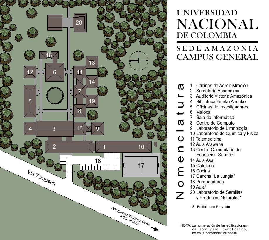 plano de la Universidad Nacional de Colombia sede Amazonia. El mapa esta basado en varios planos encontrados en las páginas web de la Universidad, si contiene algún error, favor notifíquelo en mi página de usuario, en la sección discusión.